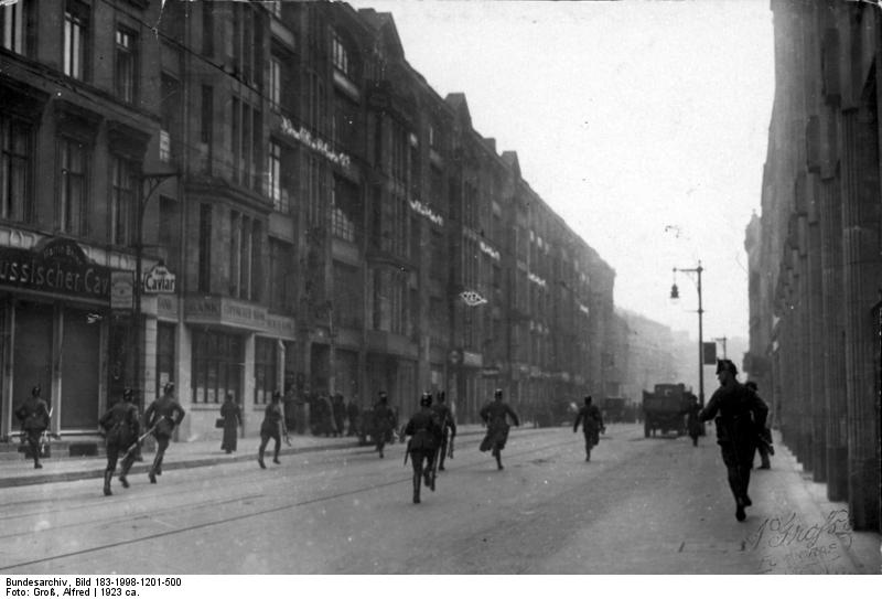 Berlin, Sturmangriff der Schutzpolizei Scherl: Sturmangriff der Schutzpolizei in der Neuen Roßstraße in Berlin [1923?] [Aufnahme: A. Groß Illustrations Verlg]